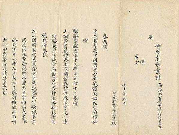 袁承業奏請酌裁釐金禁種罌粟事摺。